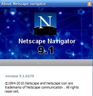 Netscape navigator 9.1.0270 prebeta 3